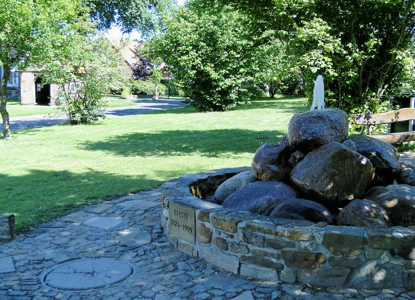 Idyllischer Dorfplatz in Rieste